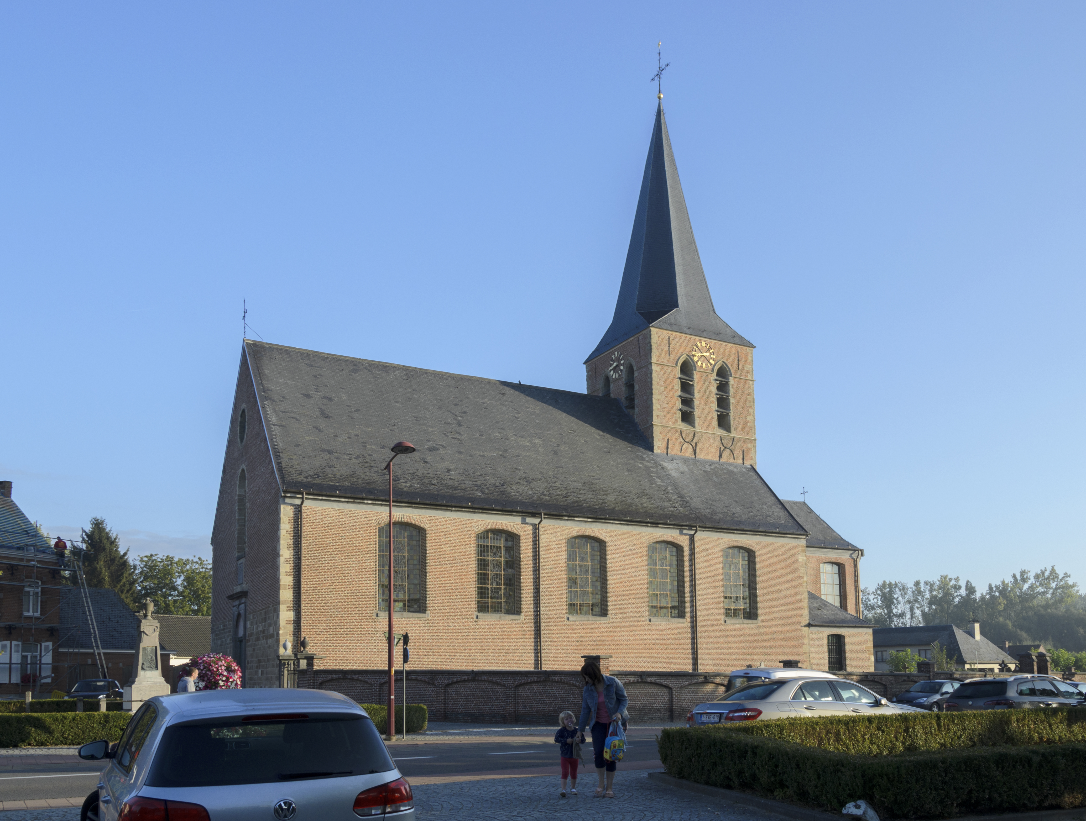 Sint-Pietersbandenkerk van Ophasselt (deelgemeente van Geraardsbergen) ; beschermd monument